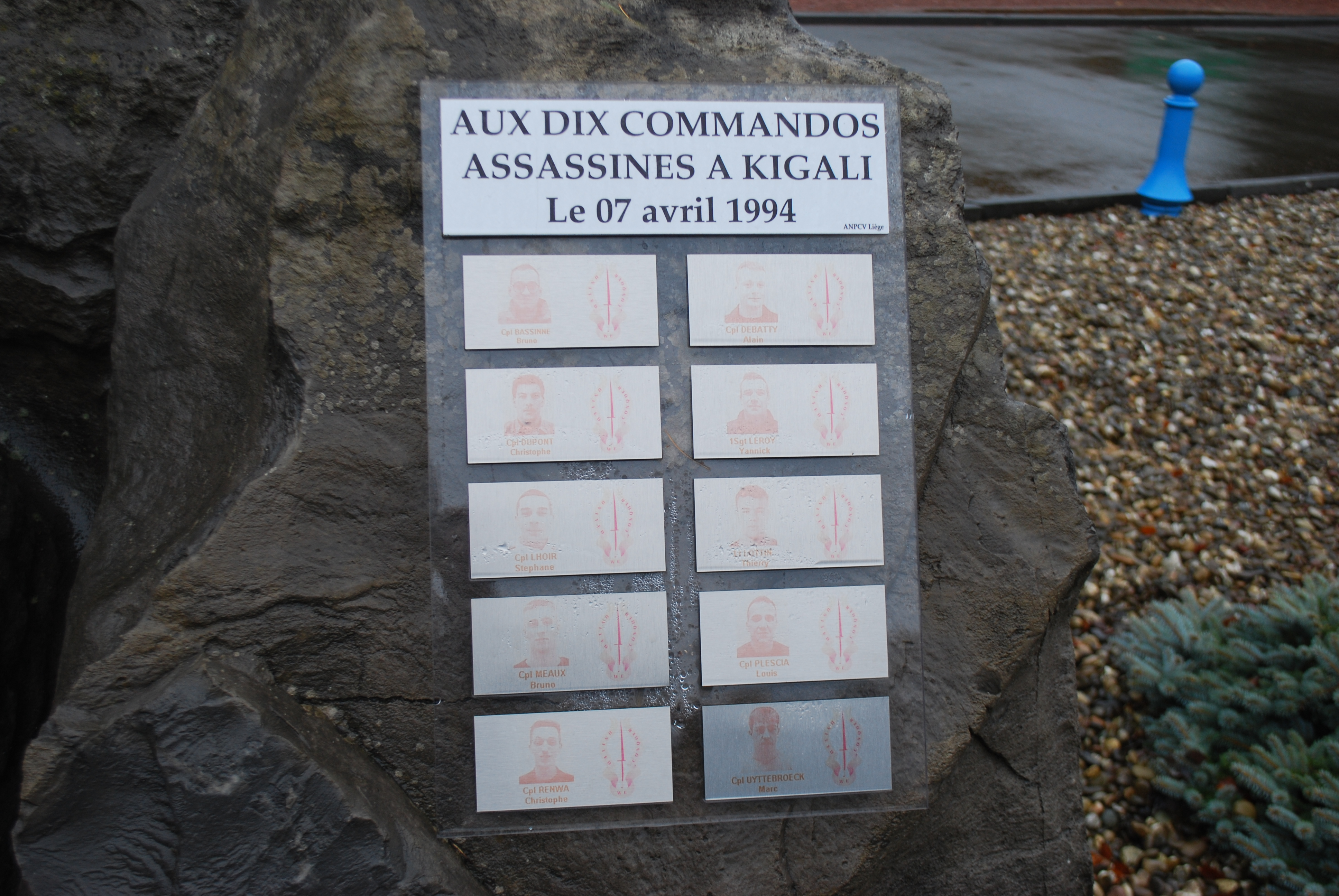 Le cimetière de la Cense Rouge, sur les hauteurs de Liège (commune de Seraing, Belgique).